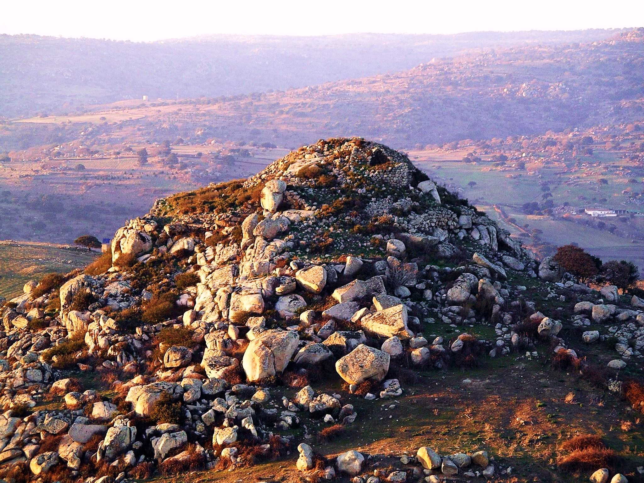 I "tres nuraghes" sono tre nuraghi ravvicinati che dominano la zona di Corte.